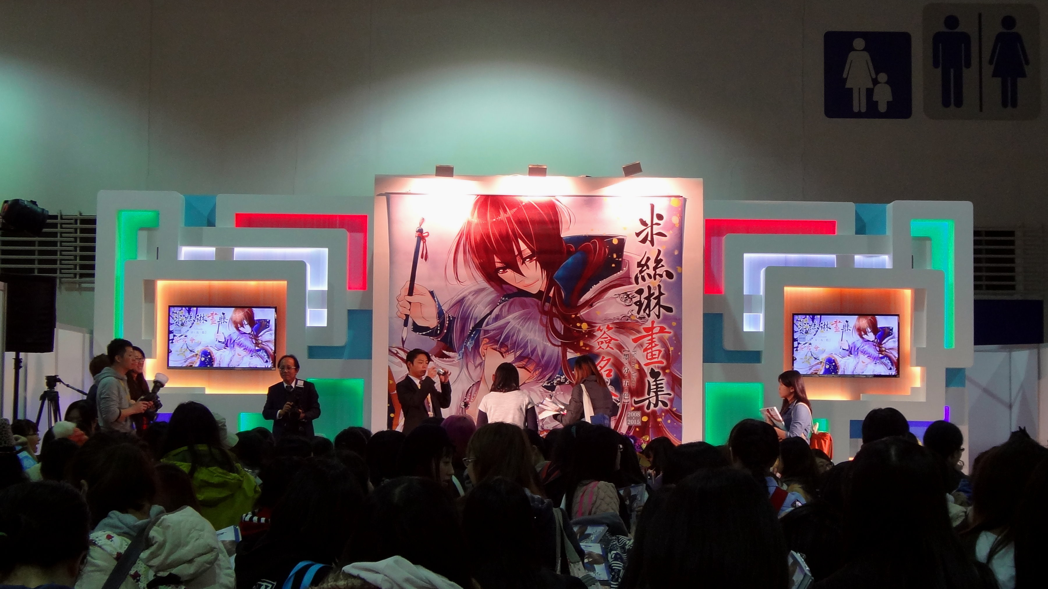 2016年第四屆台北國際動漫節B舞台，尖端出版漫畫家米絲琳《米絲琳畫集~墨分五色~》簽名會。